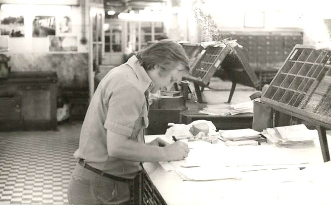 Pintér Tamás író, újságíró, az Élet és Irodalom olvasószerkesztője a Szikra nyomdában, Budapest, Blaha Lujza tér